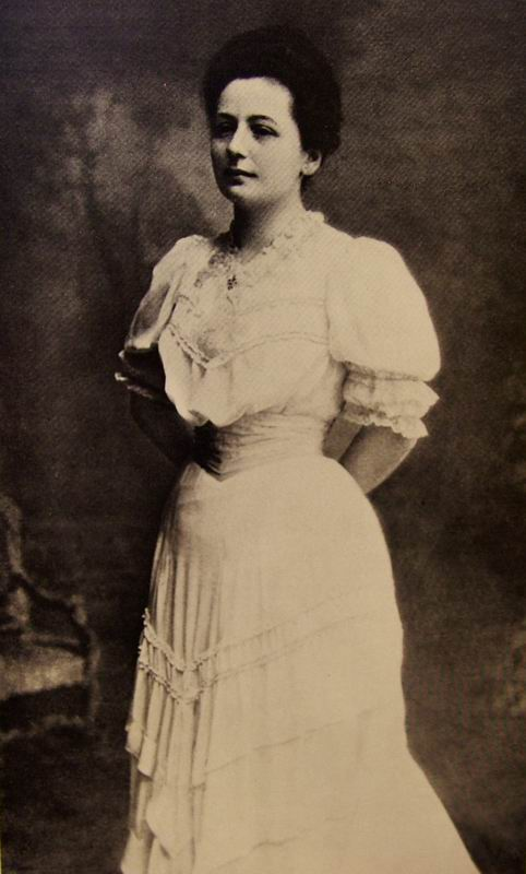 Вера Ивановна Скрябина (Исакович) - первая жена композитора Скрябина (к моменту съёмки фото они уже расстались) примерно 1906-1907 год, профессор консерватории по классу фортепиано